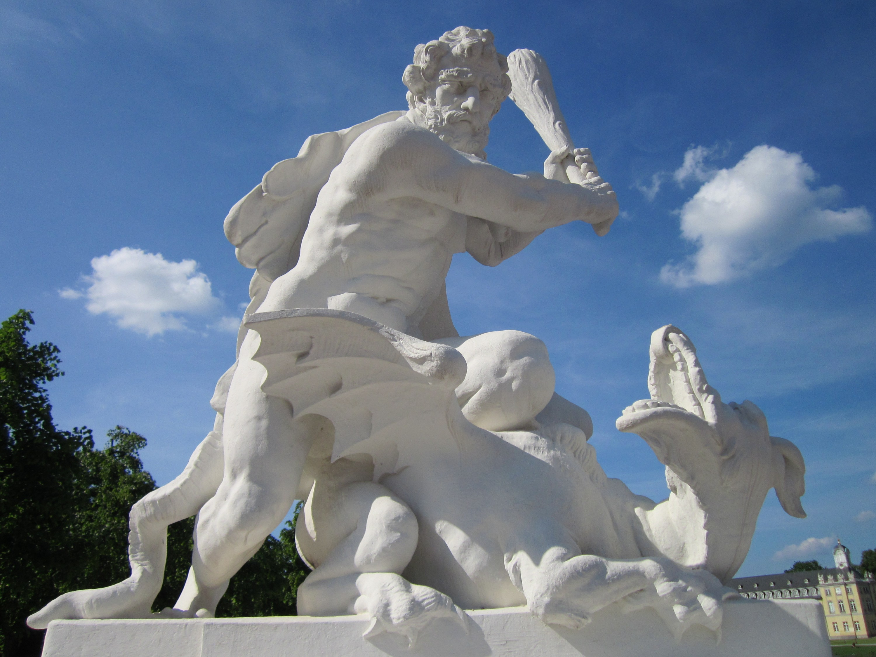 Schloss Karlsruhe